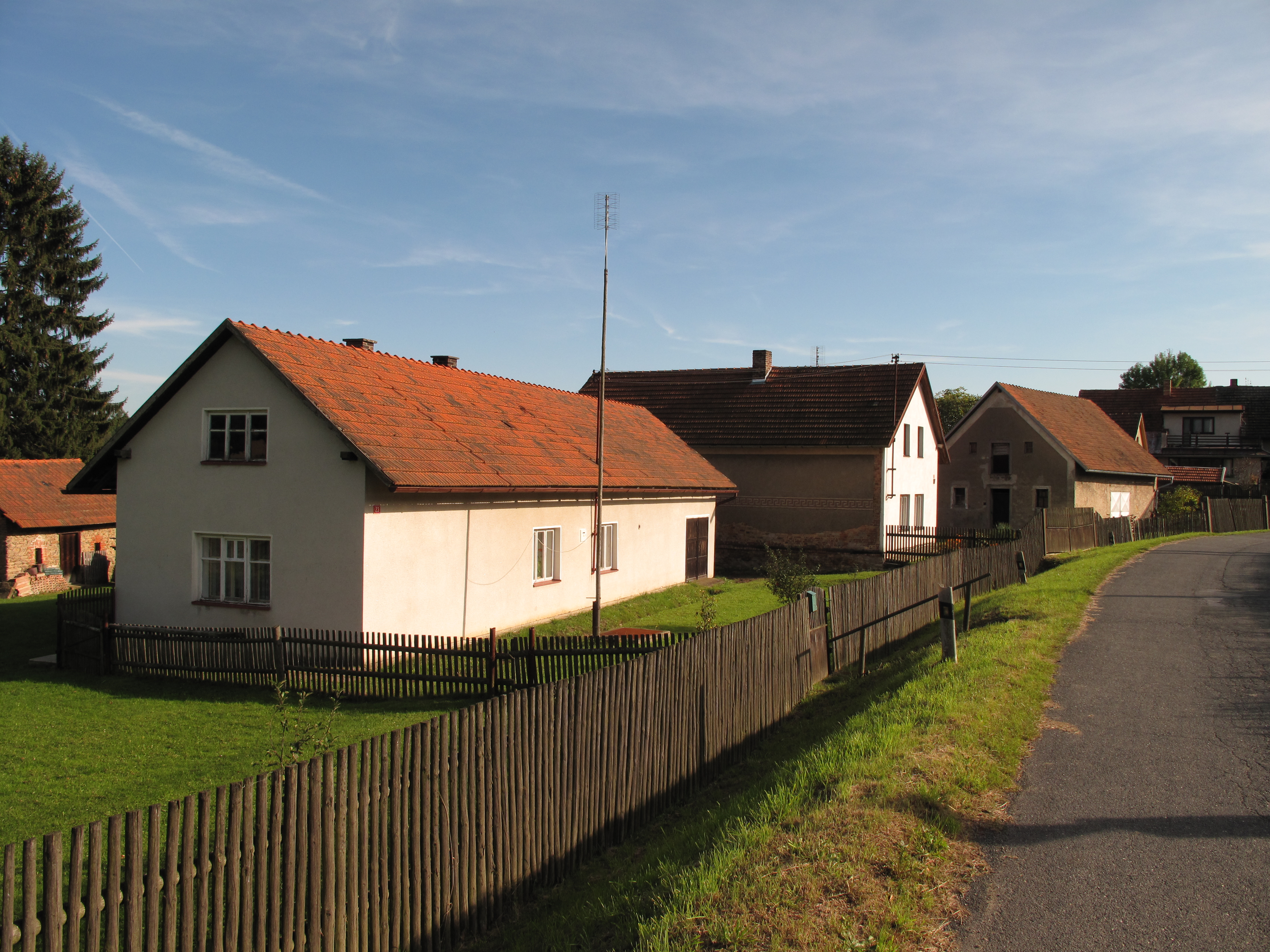 Plot a dům v Nových Nespeřicích. Okres Kutná Hora, Česká republika.